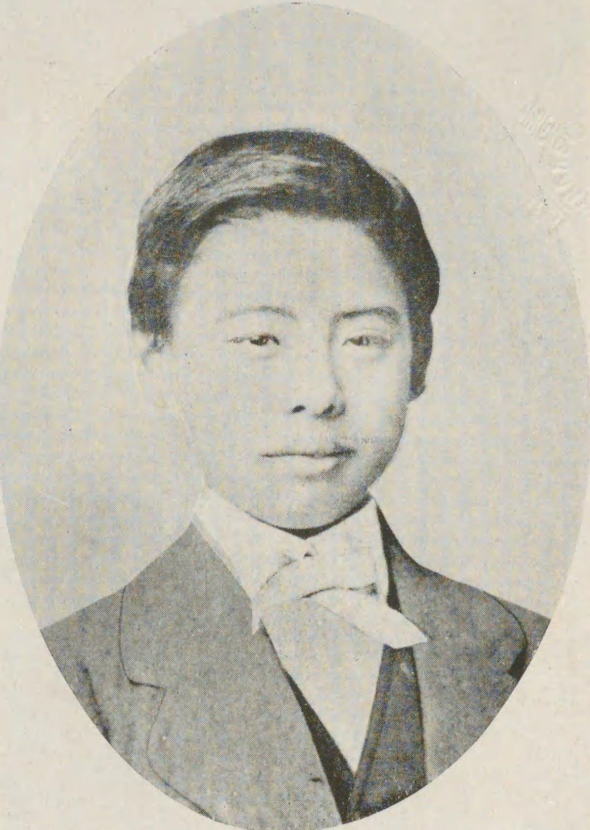 ボストン滞在中の平岡凞